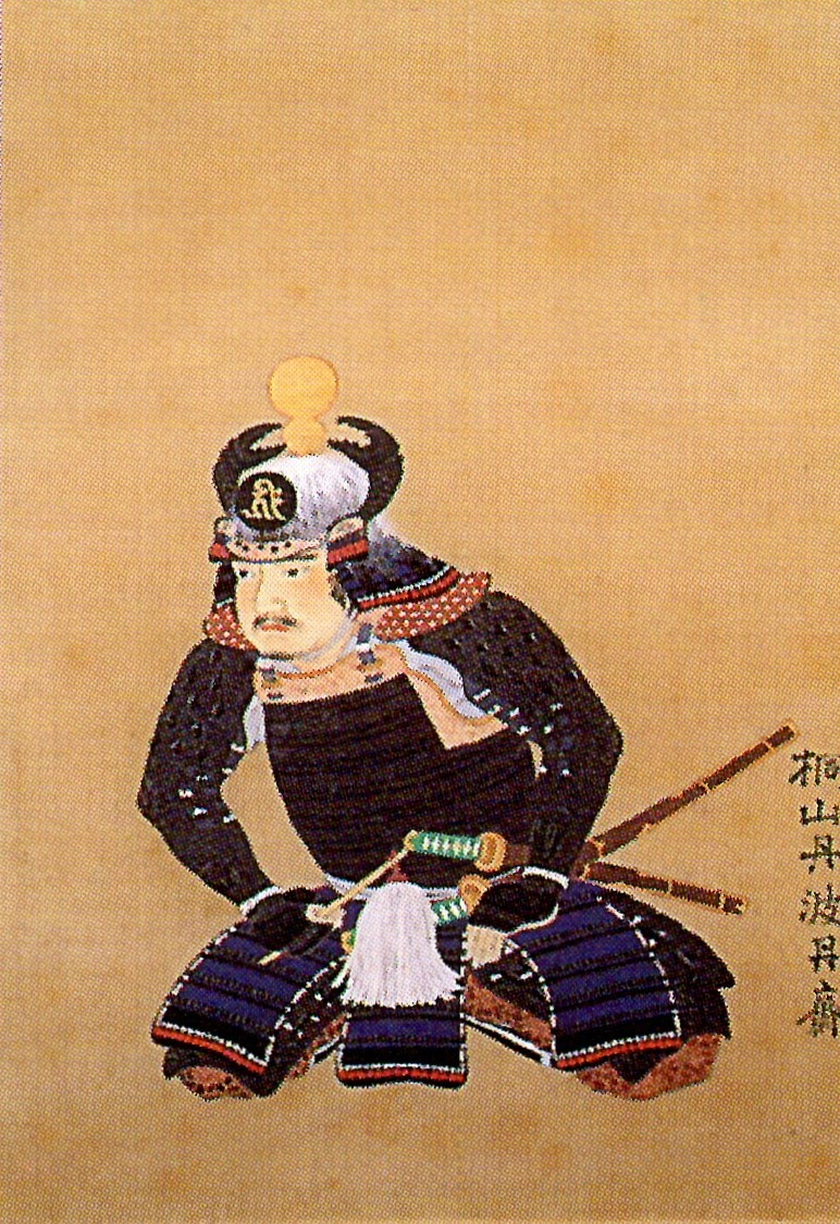 桐山信行の肖像。